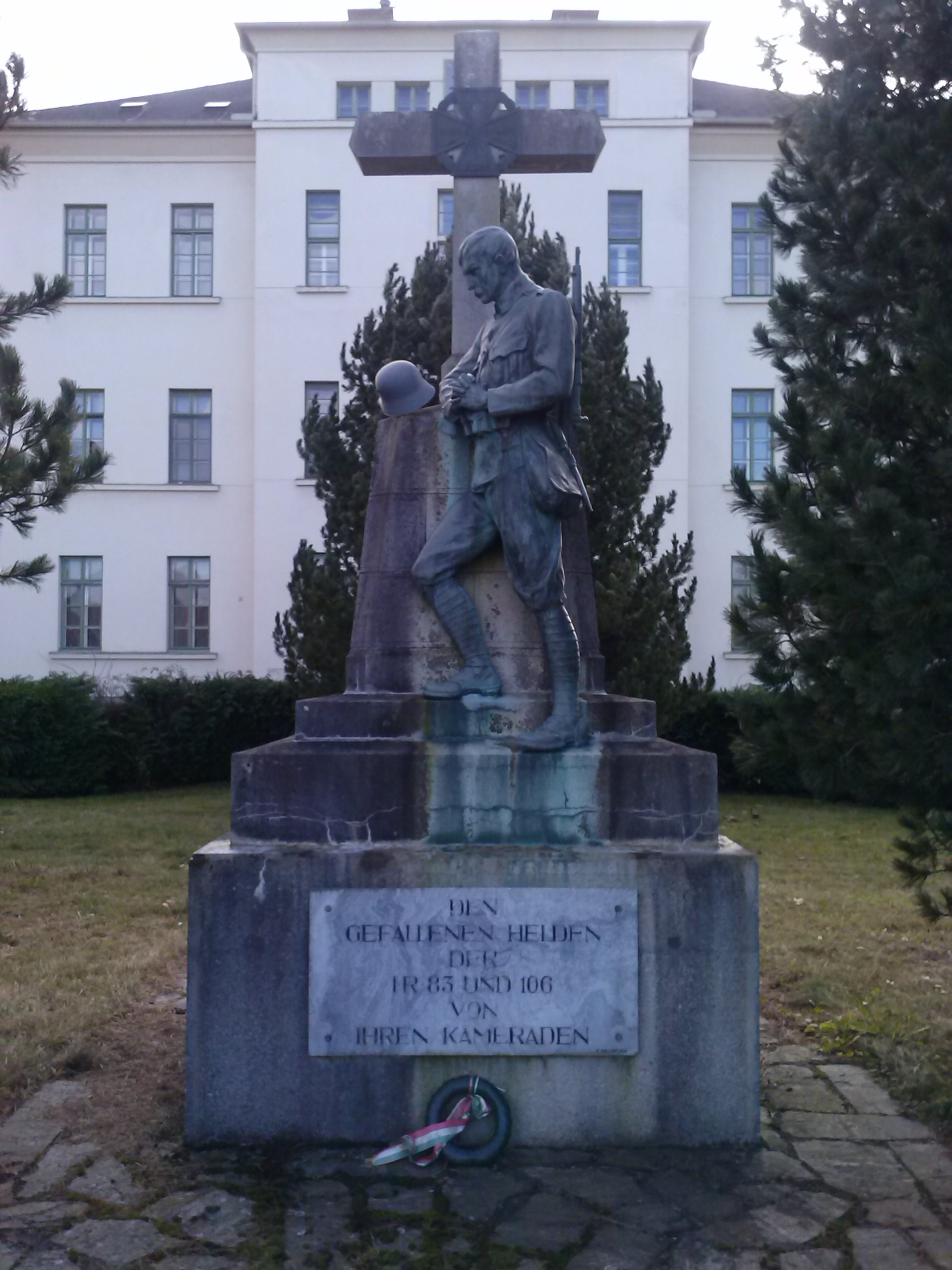 Denkmal zu Ehren IR 83 und 106 - Turbakaserne Pinkafeld